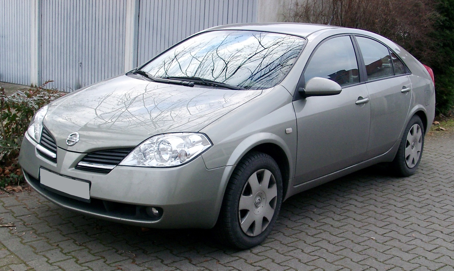 Nissan Primera, 3. Generation